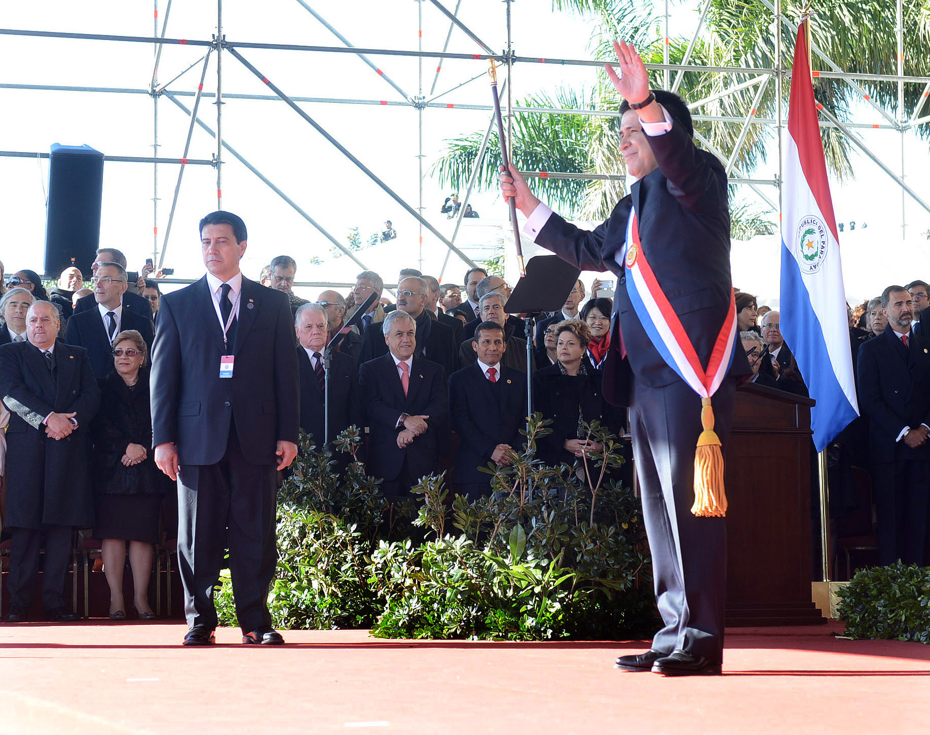 El flamante presidente del Paraguay, Horacio Cartes. Entre la concurrencia se distinguen Sebastián Piñera, Dilma Rousseff, Ollanta Humala y el príncipe Felipe de Borbón y Grecia.